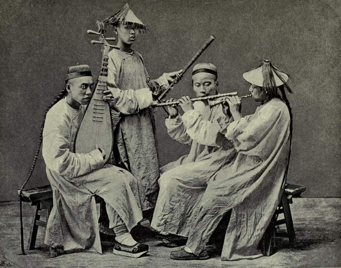 中国の音楽家